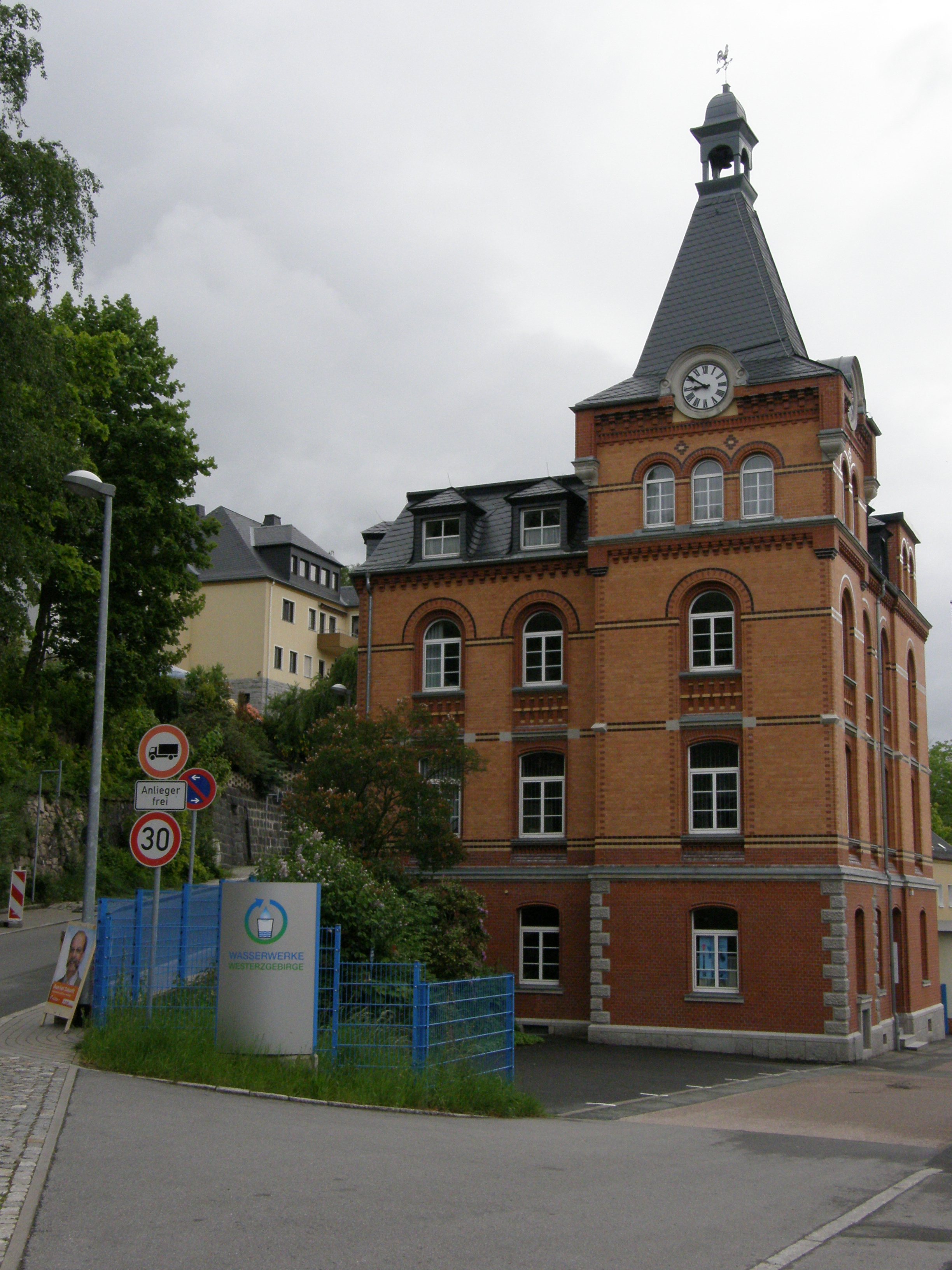 Stadt Aue, früheres Rathaus Zelle